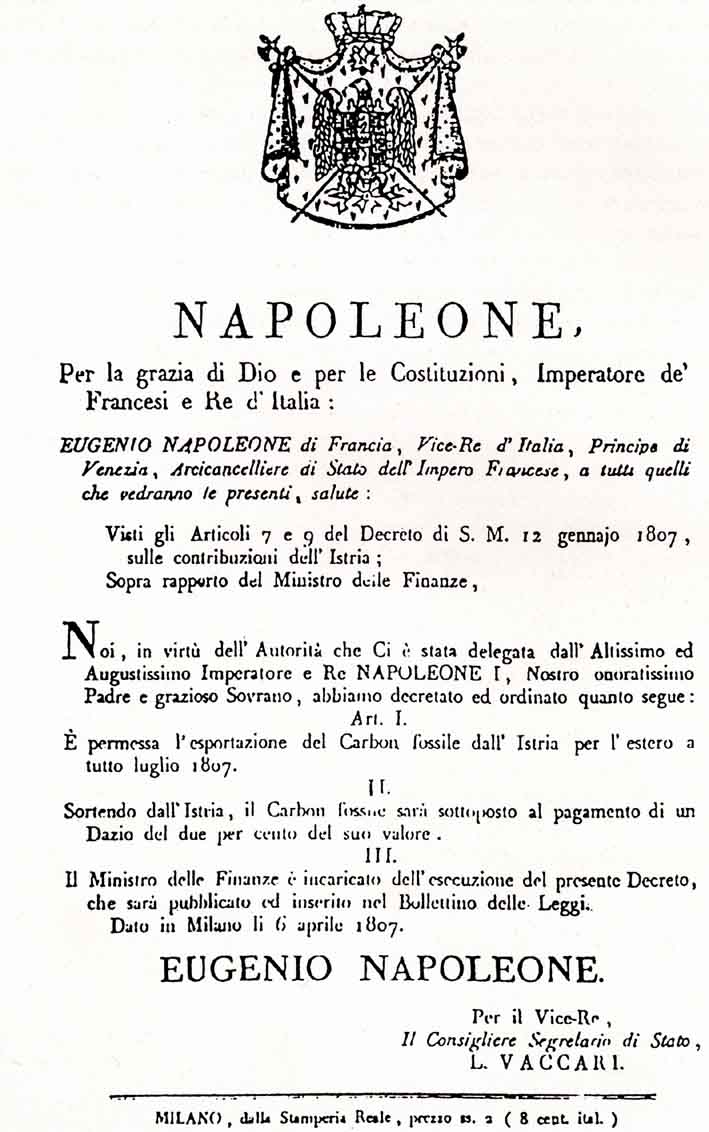 dekret iz 1807. godine kojim se dozvoljava izvoz ugljena iz Istre